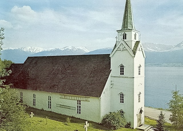 Vereide kirke